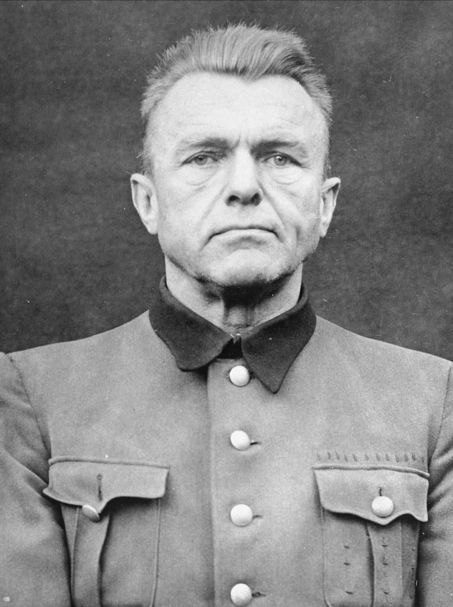 Portrait of Karl August Genzken as a defendant in the Medical Case Trial at Nuremberg. [Photograph #07327], Portrait von Karl August Genzken als Angeklagter im Nürnberger Ärzteprozess. [Fotografie##07327]